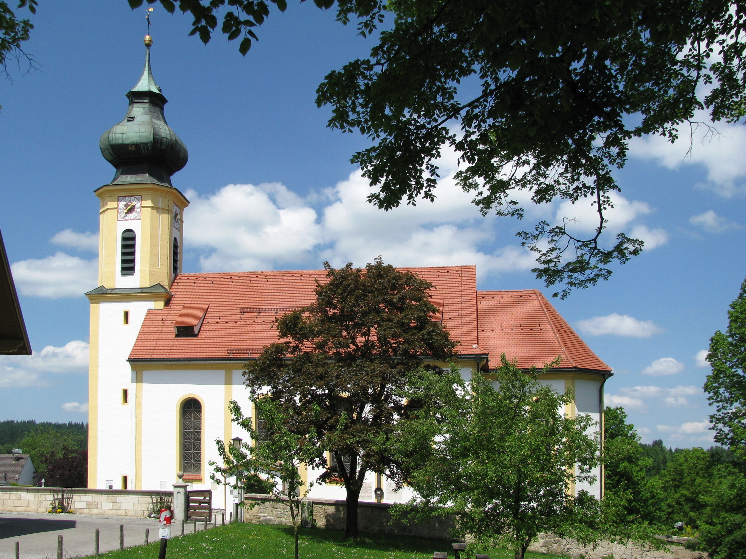 Kath. Pfarrkirche St. Jakob von Süden